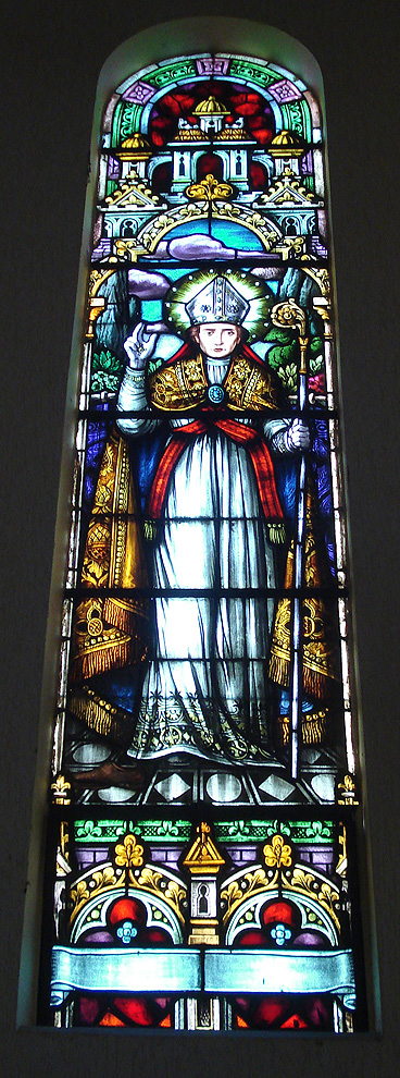 Vitral da Igreja de Nossa senhora de Lourdes, Caxias do Sul, Brasil. Santo não identificado, mas possivelmente seja São Gotardo